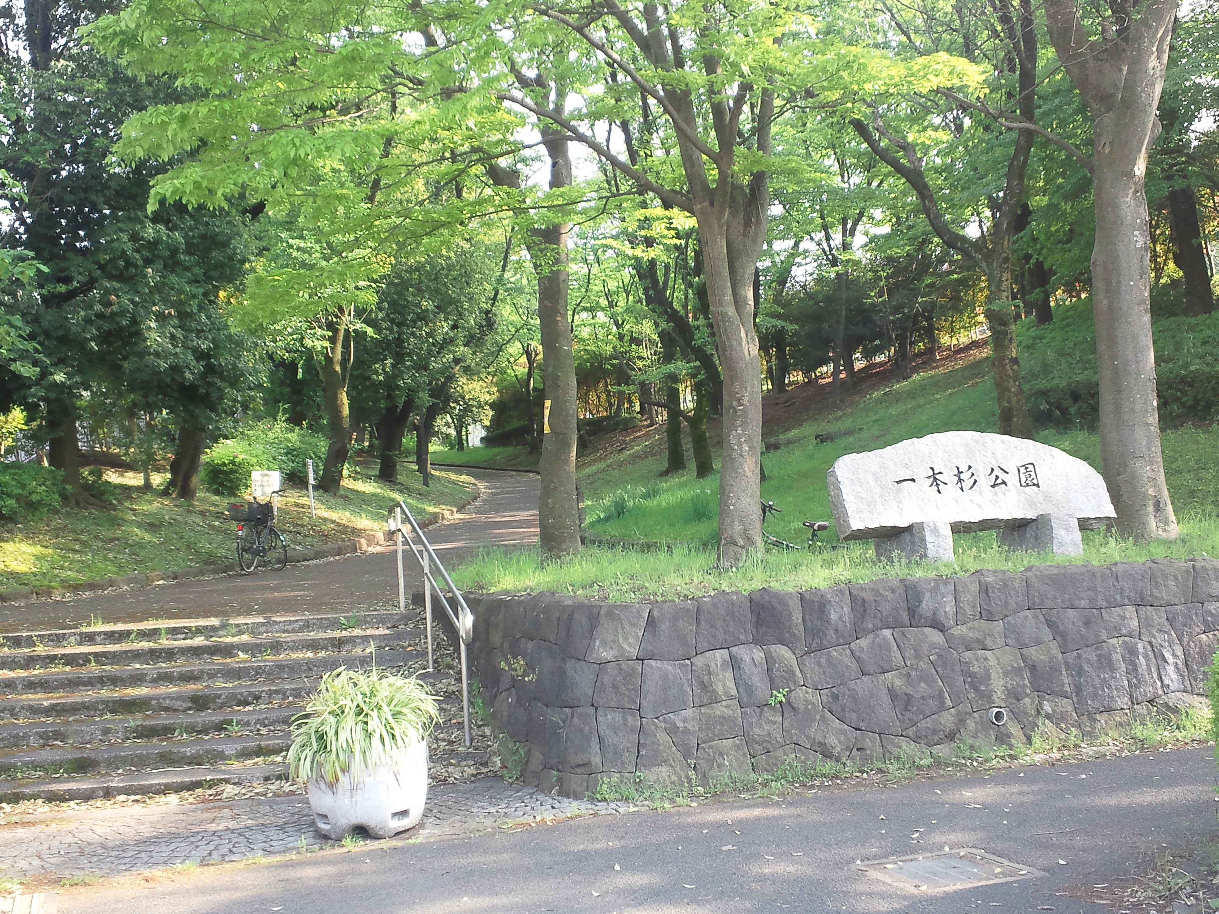 一本杉公園（旧小野路町）